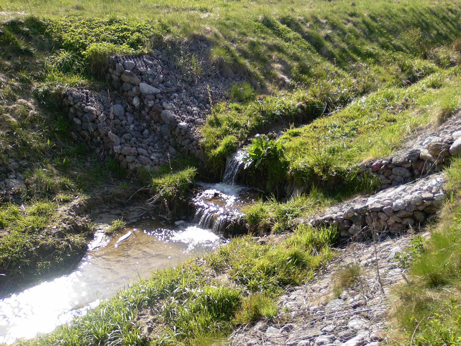 Potok Oruński / Ohrabach